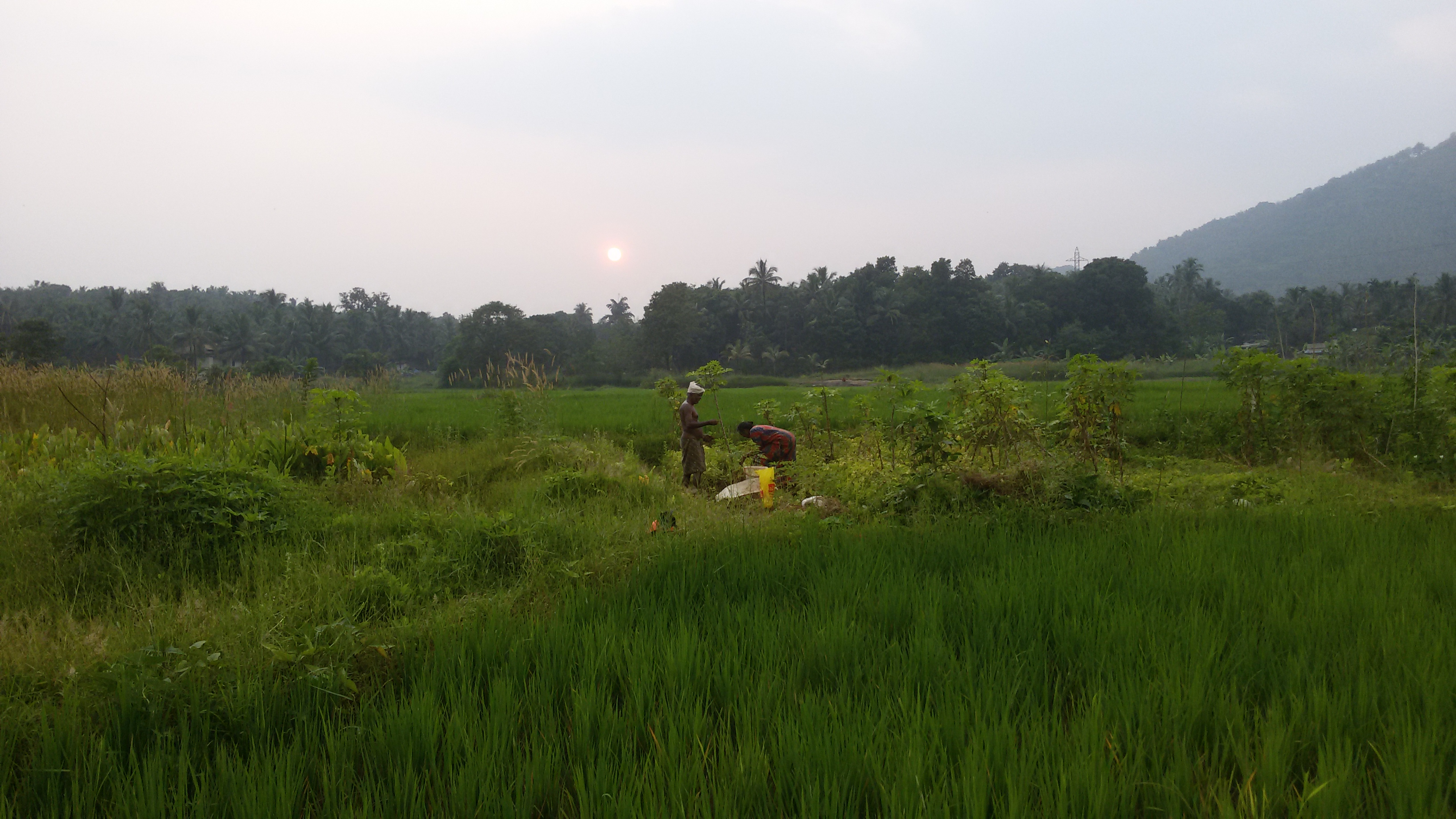 കർഷക ദമ്പതികൾ